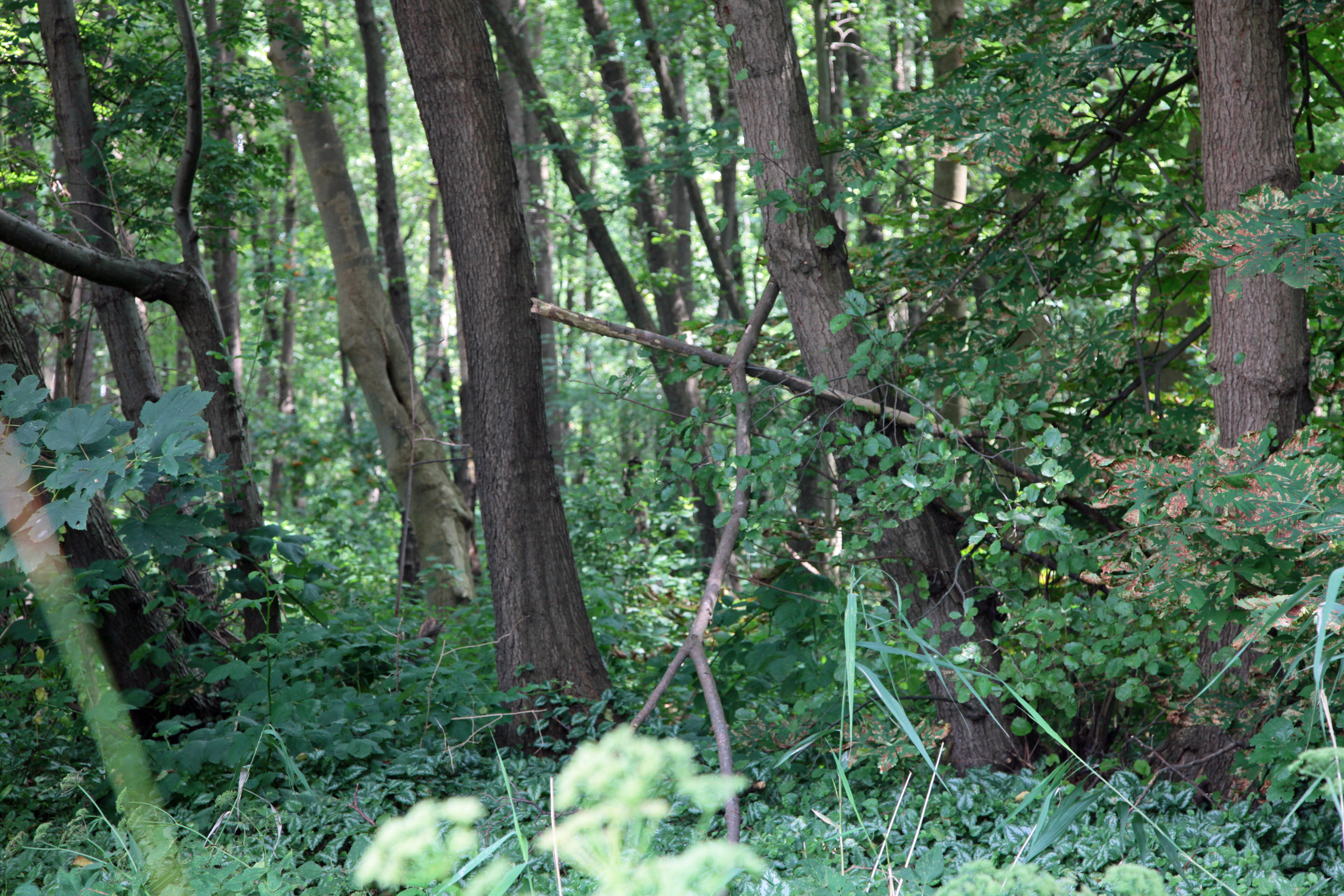 Vogelschutzgehölz in Bremen-Huchting,betreten nicht erwünscht(nicht erlaubt ?)